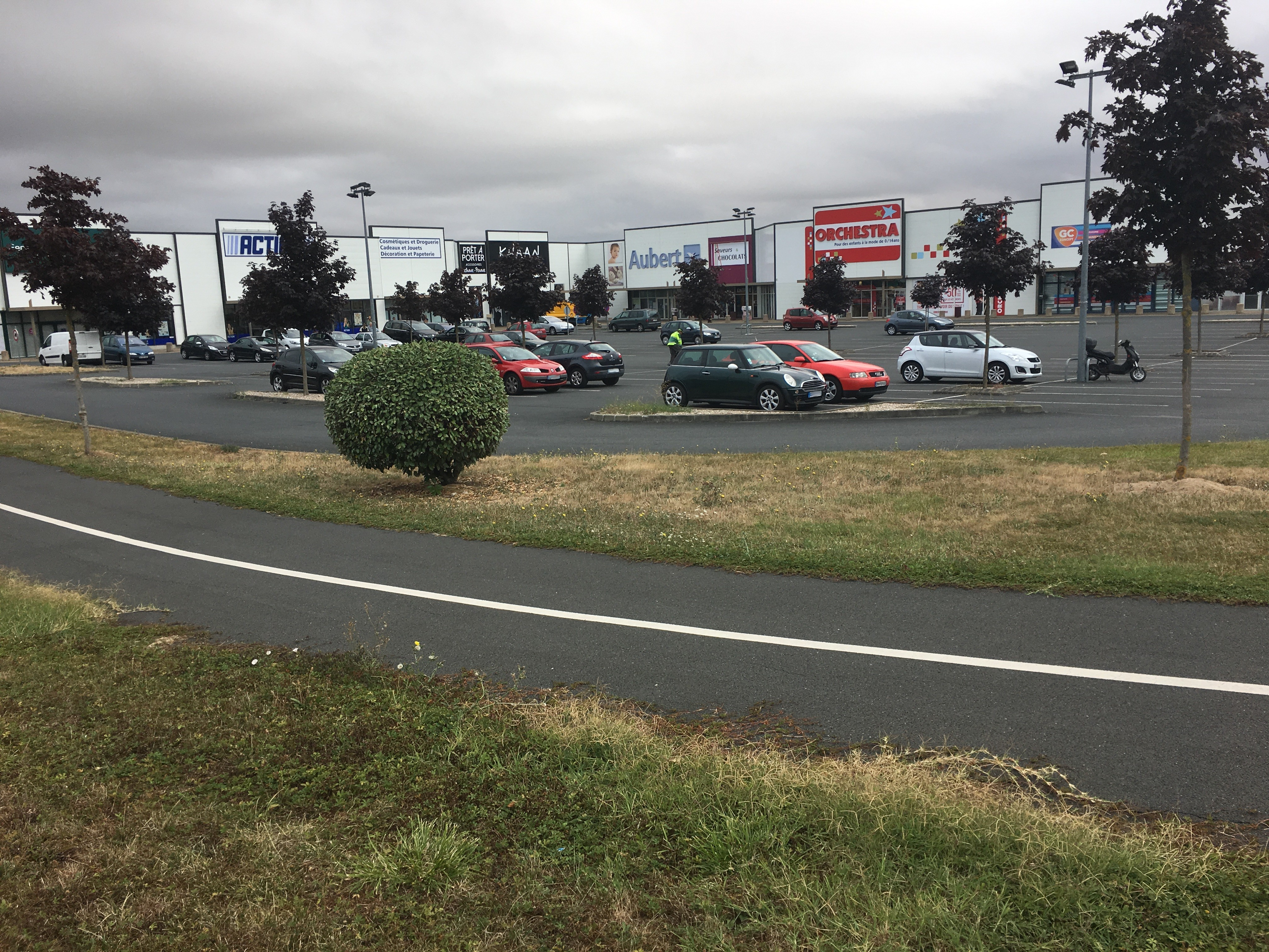 Zone commerciale Cap Sud : Magasins.